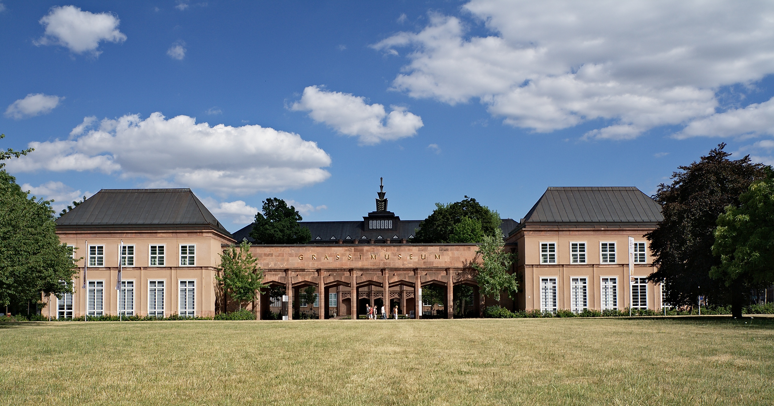 Eingang des Grassimuseums in Leipzig